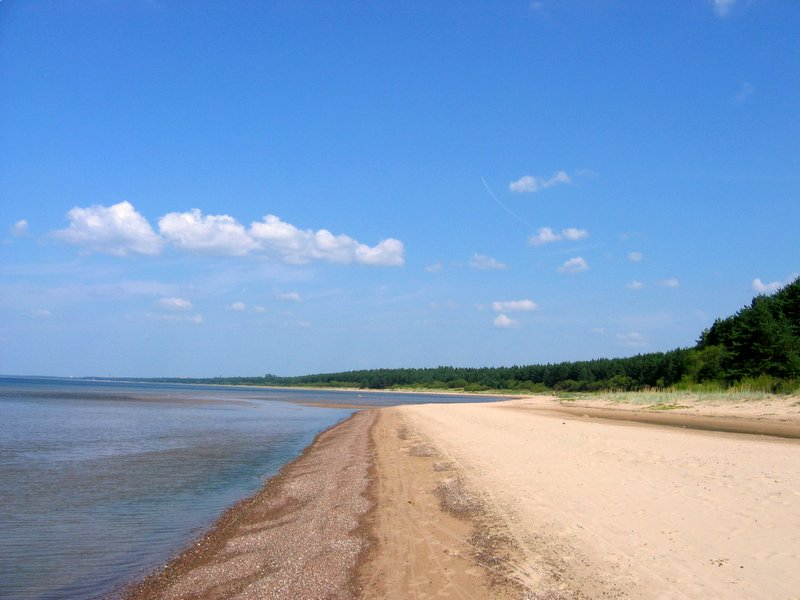 Meriküla rand